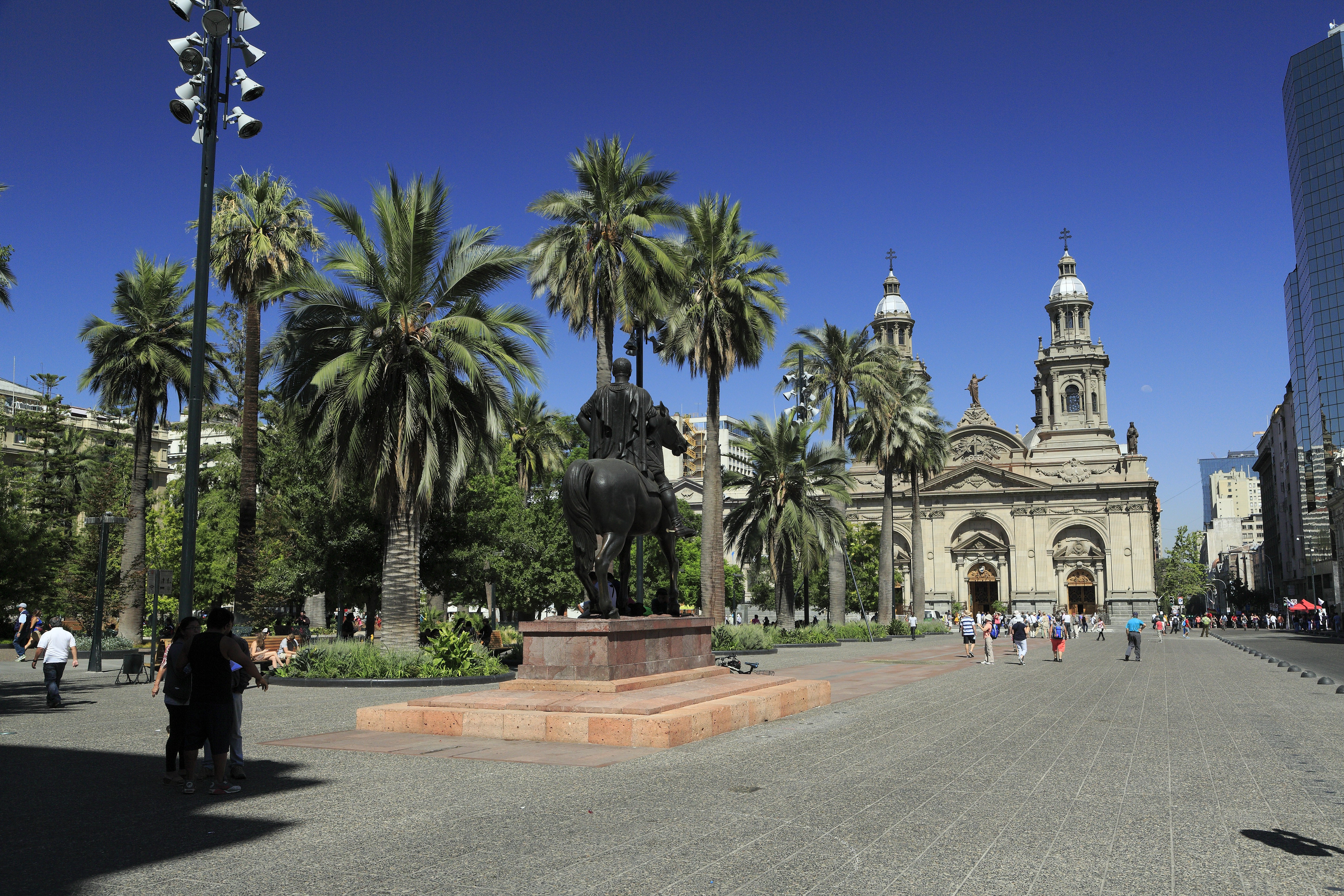 Richtung Kathedrale, die Straße rechts ist die Calle Catedrál, die mit diesem Namen bis zum Ende am Parque Quinta Normal führt. Links in der Mitte das Reiterstandbild des Stadtgründers Pedro de Valdivia.